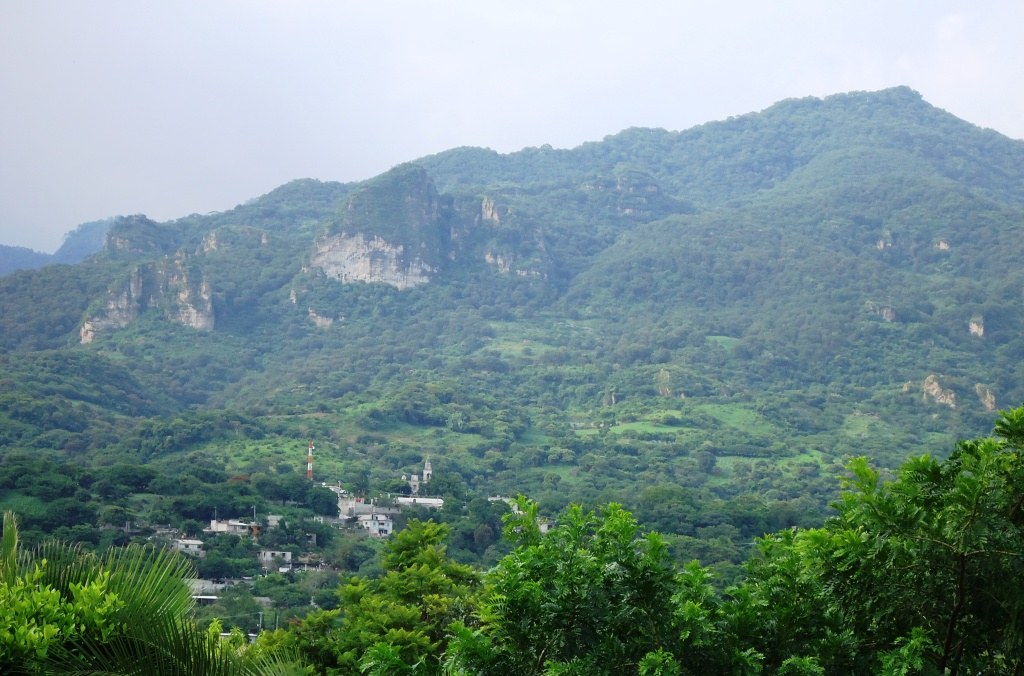 Panoramic photo of Palpan, Morelos